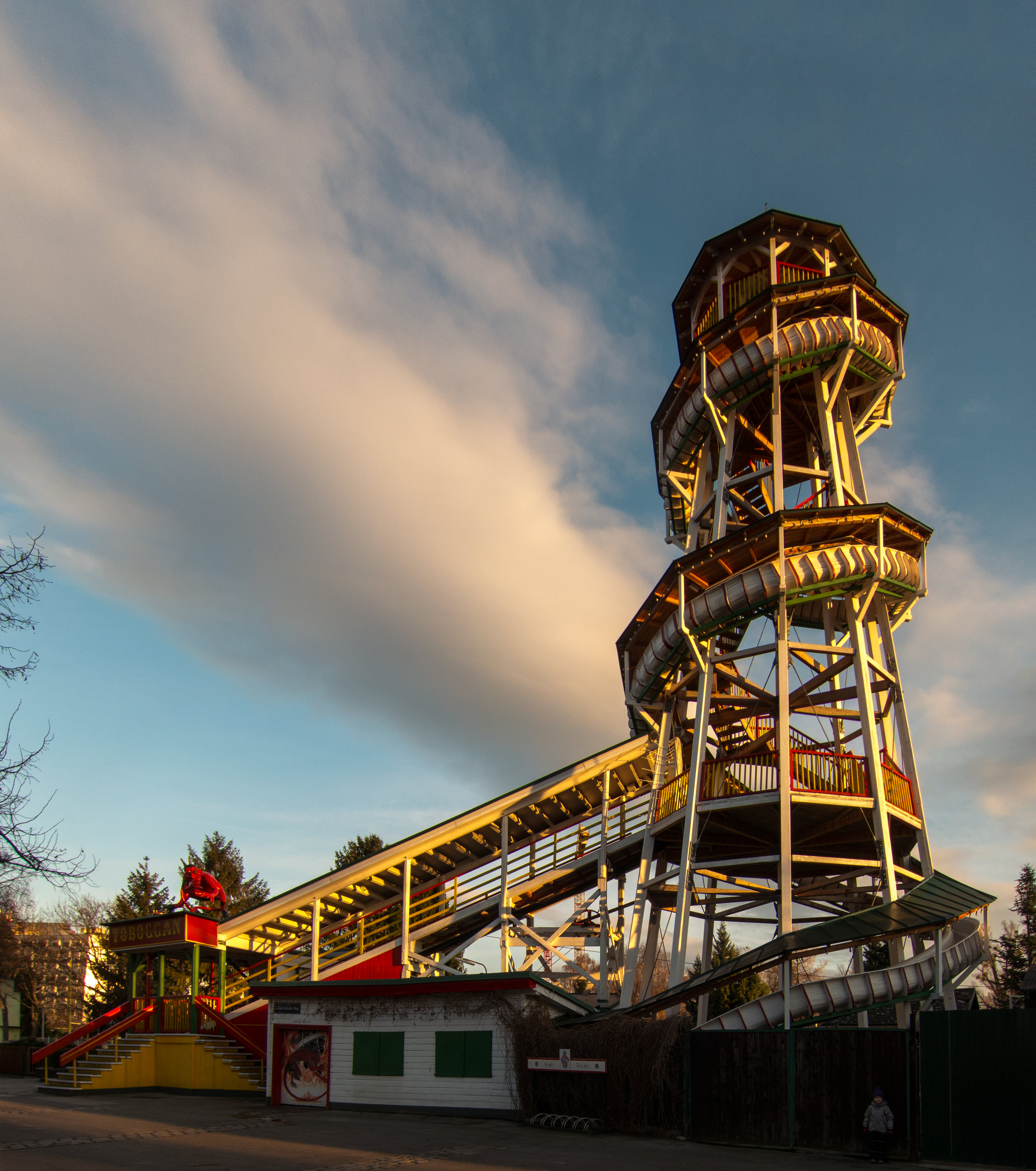 Toboggan (Rutschbahn)